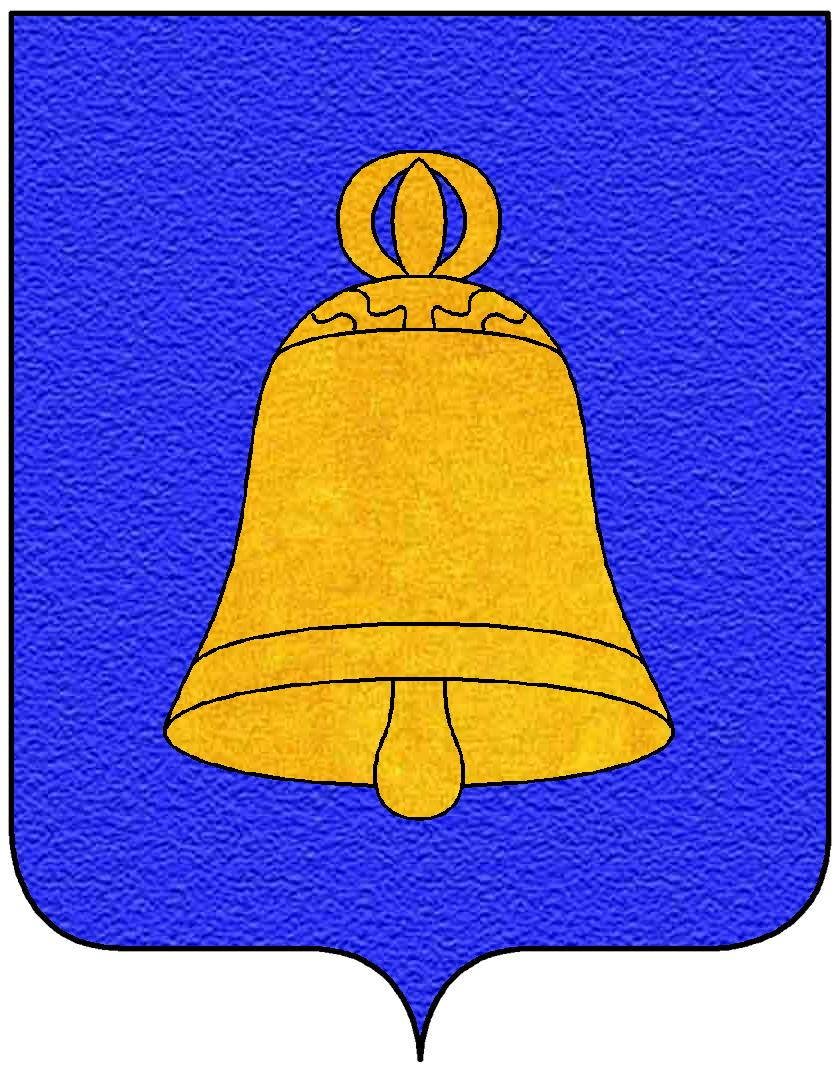 Stemma della famiglia Sanclemente